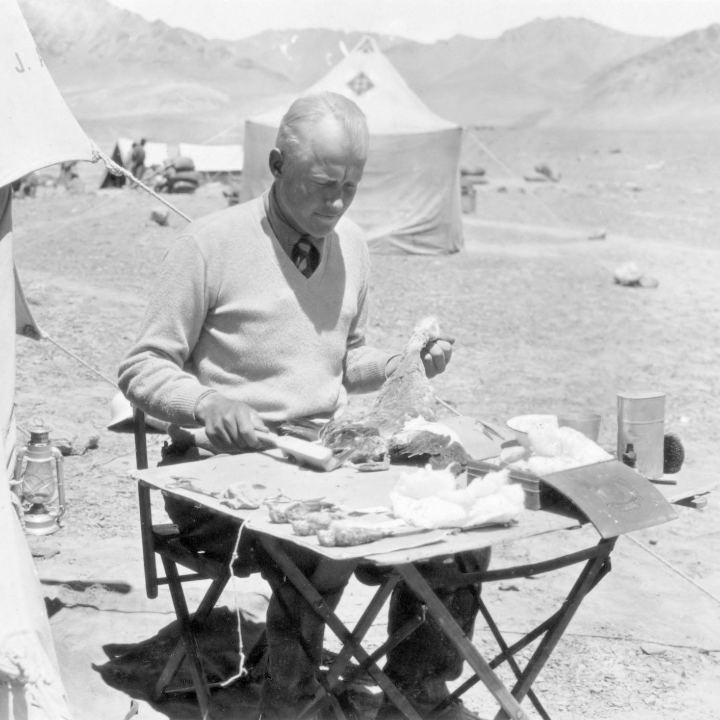 [DLC] Fotoalbum Visser: Derde Karakorumexpeditie, 1929-1930. Albumblad met vier foto's. Linksboven: handelskaravaan met dromedarissen bij Daulat beg öldi; linksonder: J.A. Sillem aan het werk bij Daulat beg öldi; rechtsboven: expeditieleden in het Ship-shap-dal; rechtsonder: het Lung-Nak-dal zuidwaarts gezien 1929/08/14